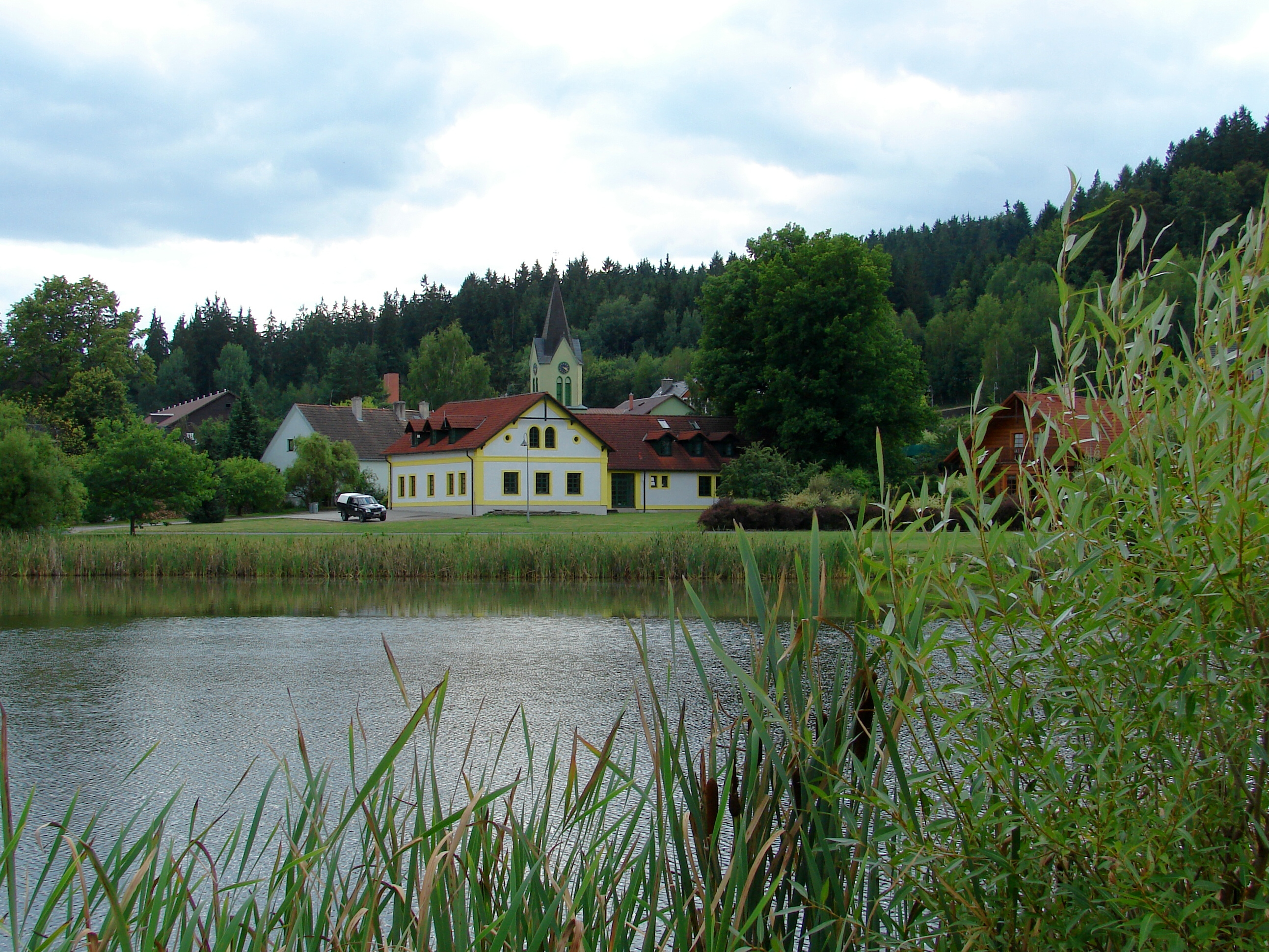 Obec Nová Pláň v blízkosti Slezské Harty.